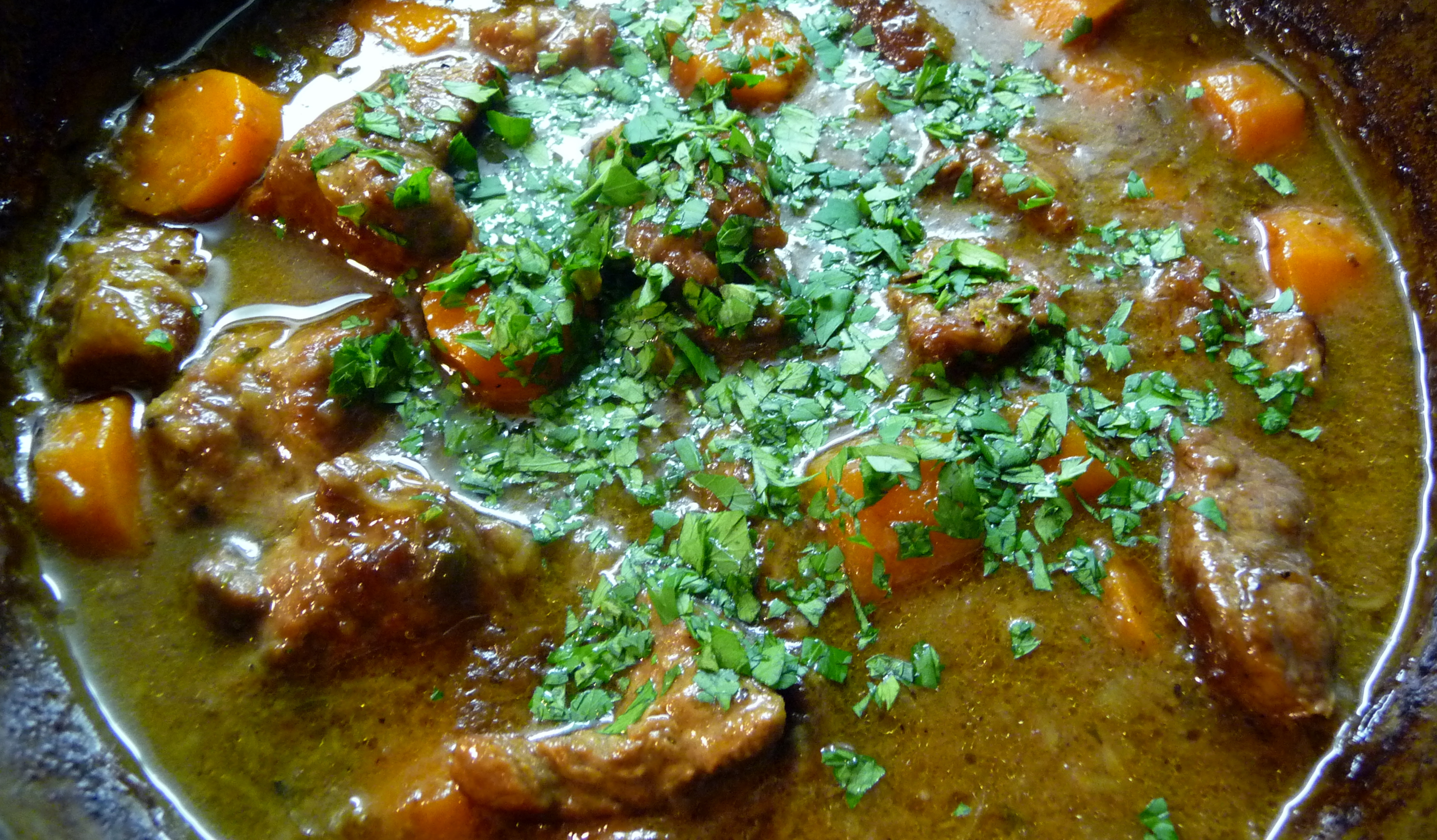 Carbonnade provençale ou carbonnée